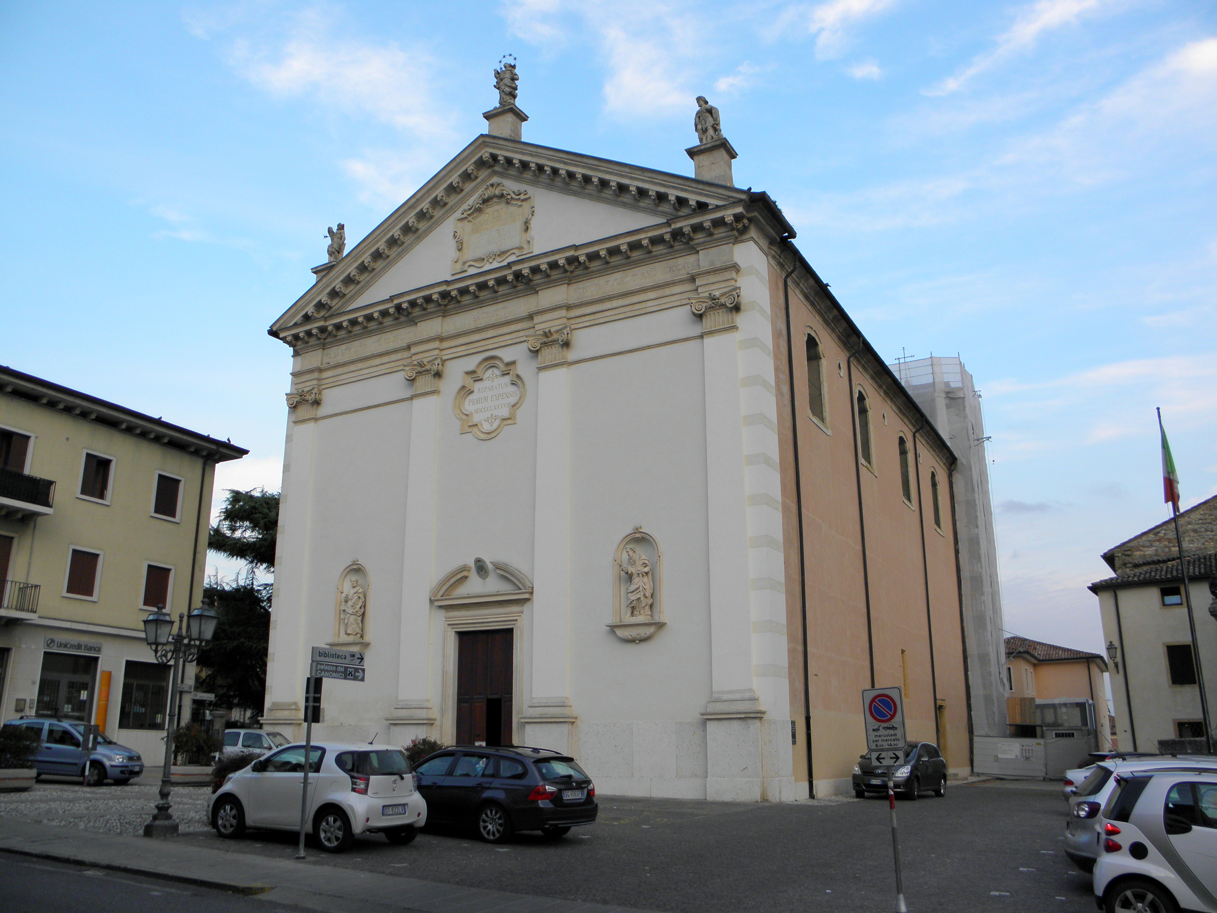 Barbarano Vicentino, chiesa di Santa Maria Assunta (XVIII secolo).